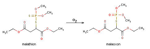 Reakční schema oxideační desulfurace malationu na malaoxon.